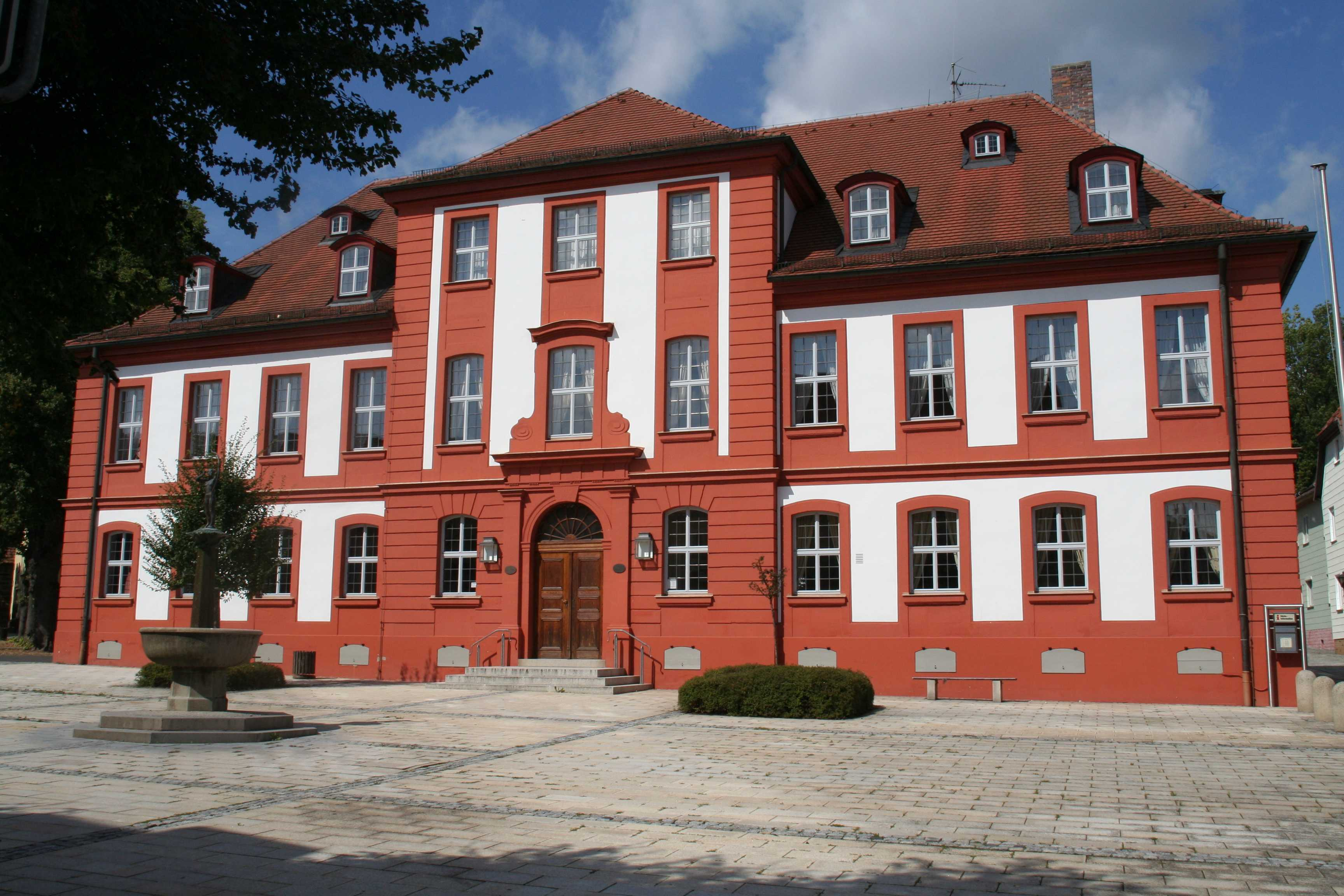 Jagdschloss Bad RodachJagdschloss in der Innenstadt Bad Rodachs im Landkreis Coburg